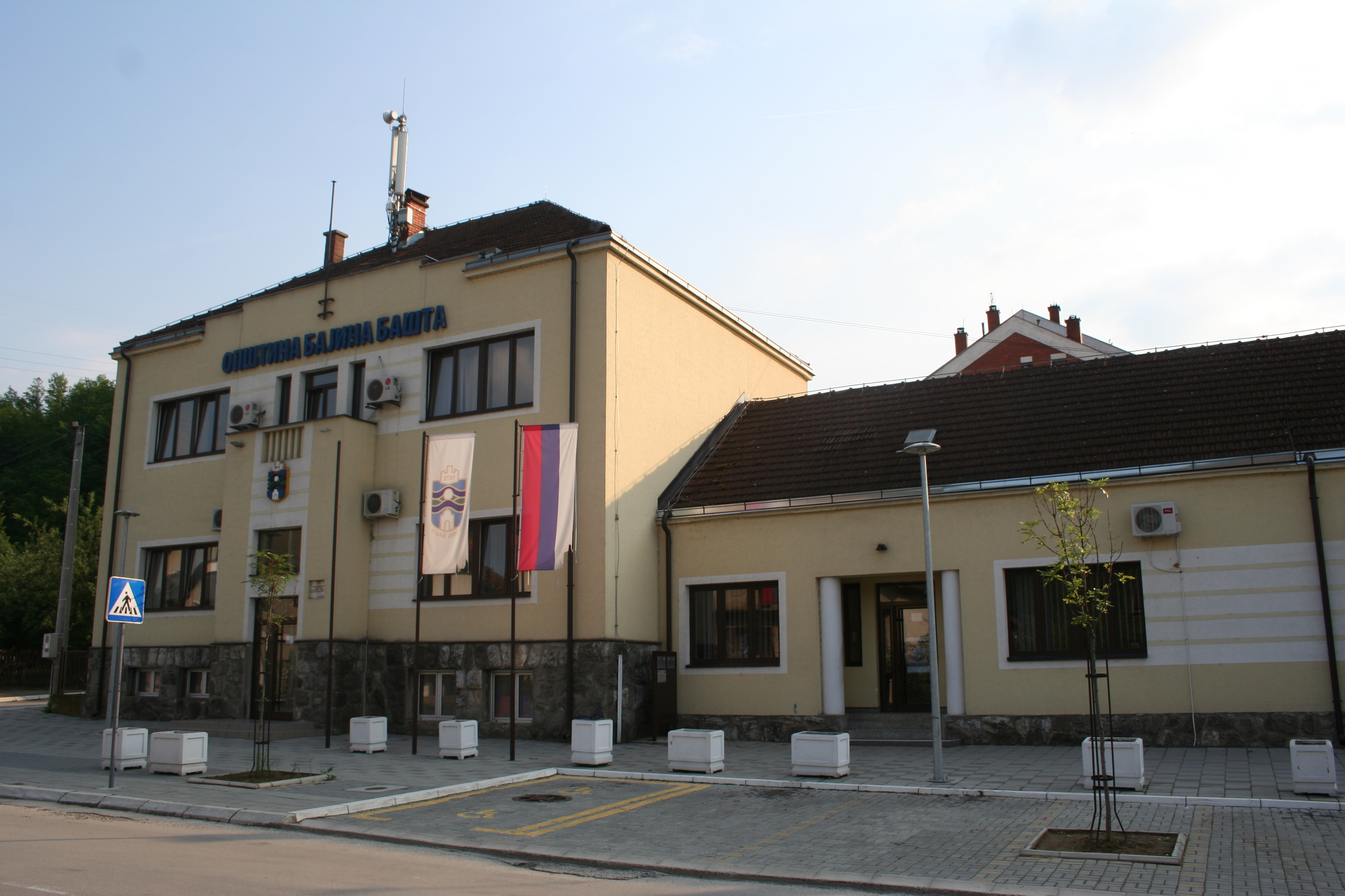 Bajina Bašta u maju 2017.